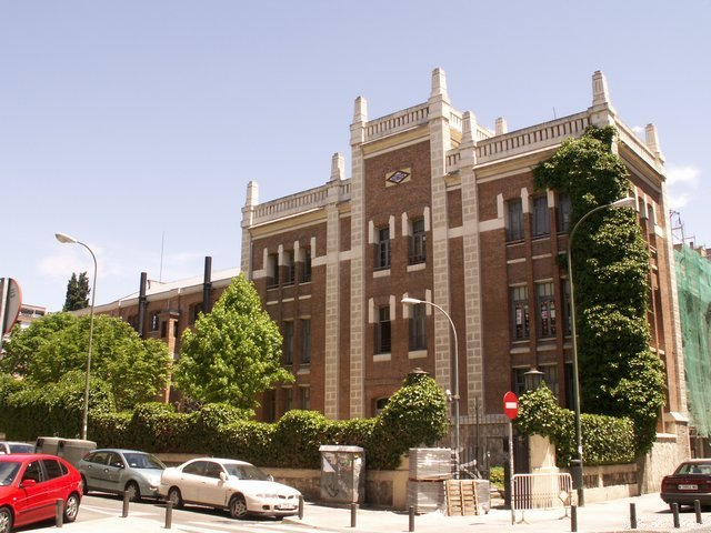 Central eléctrica del Pacífico, talleres y oficinas del Metro de Madrid. Antiguamente Ferrocarril Metropolitano Alfonso XIII de Madrid. Obra de Antonio Palacios de 1923 - 1931.